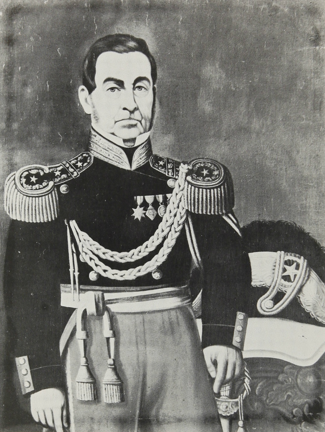 Carlos Formas Urízar; militar y político chileno. Nació en Rancagua, en 1793. Falleció en Santiago, el 13 de junio de 1861. Hijo de don José Luis Formas y Patiño, y de doña María del Carmen Urízar Suasso. Educado militarmente como un realista, posteriormente integró las filas pelucones y el Partido Conservador.